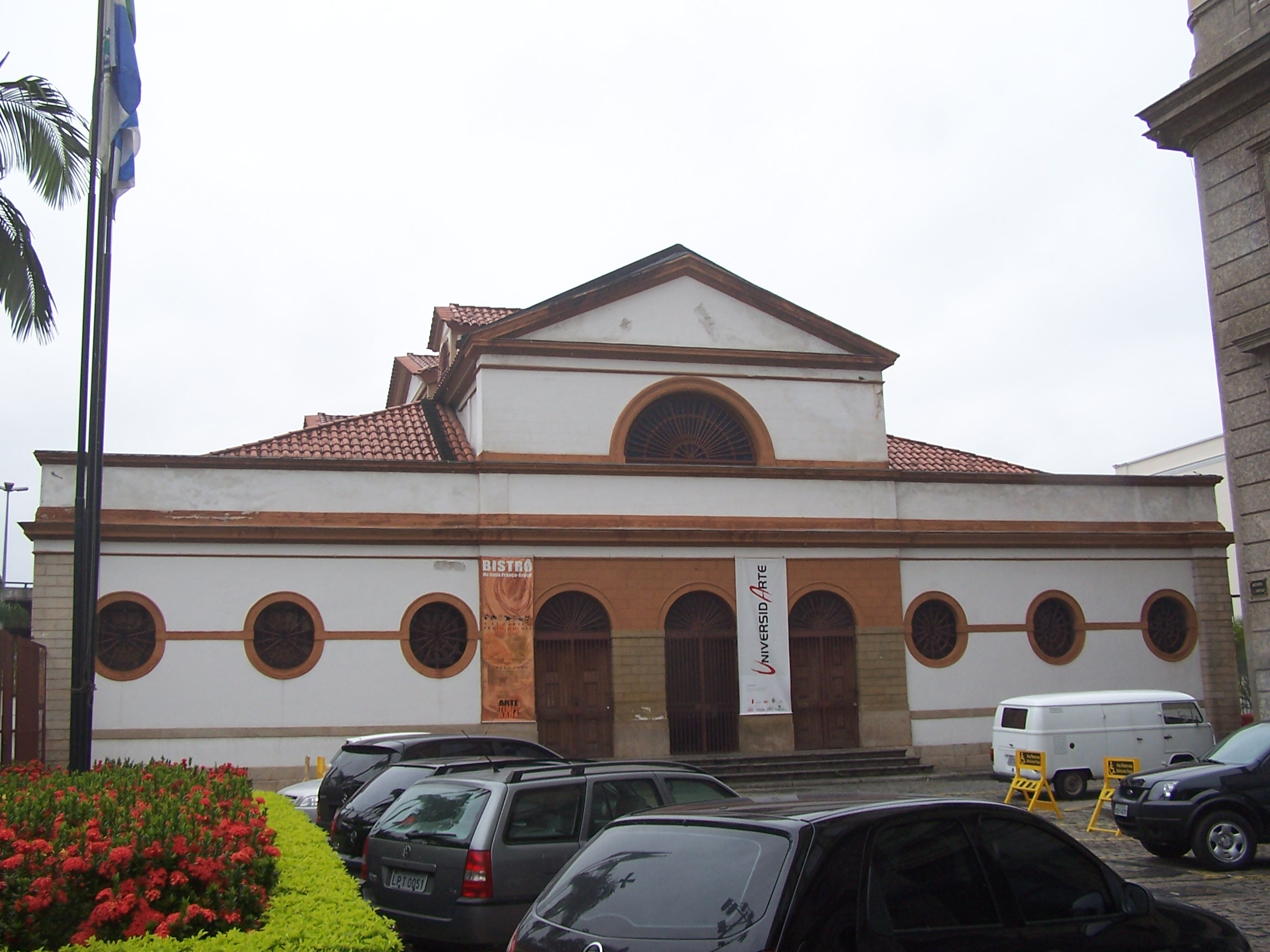 Casa França-Brasil in Rio de Janeiro.